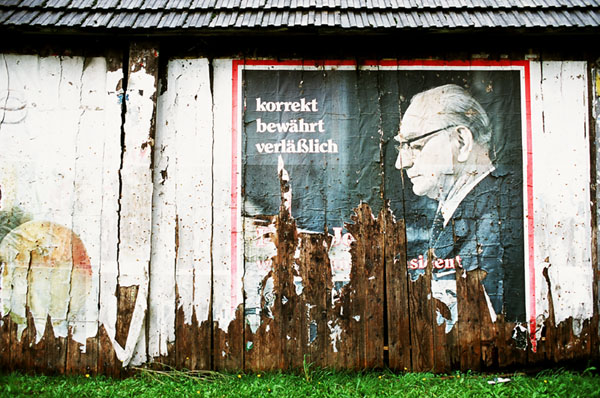 Franz Jonas, 1971, altes Wahlkampfplakat auf einer Scheune bei Hermagor/Kärnten/Österreich